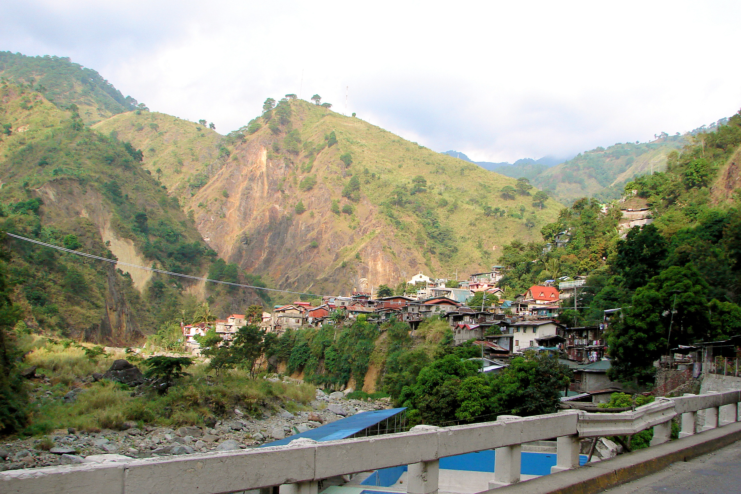 Tuba, Benguet, Philippines